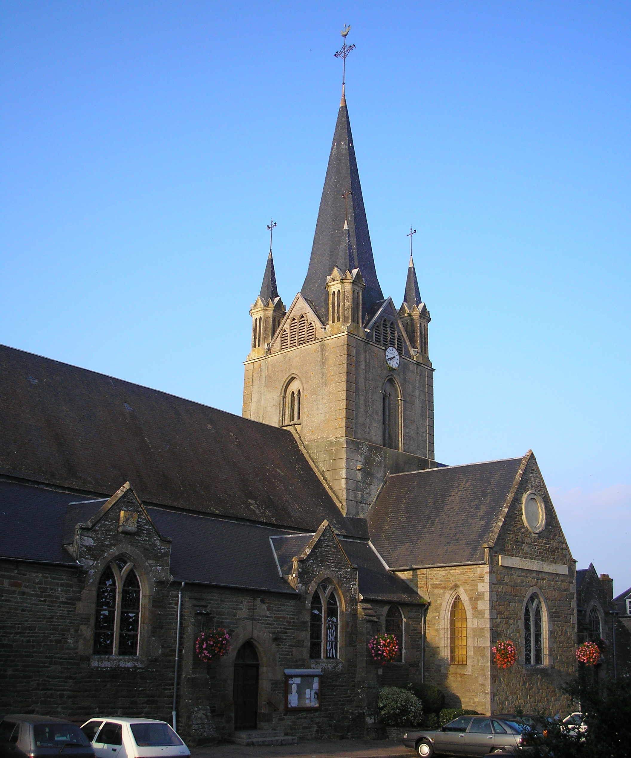 Vassy (Normandie, France). L'église.